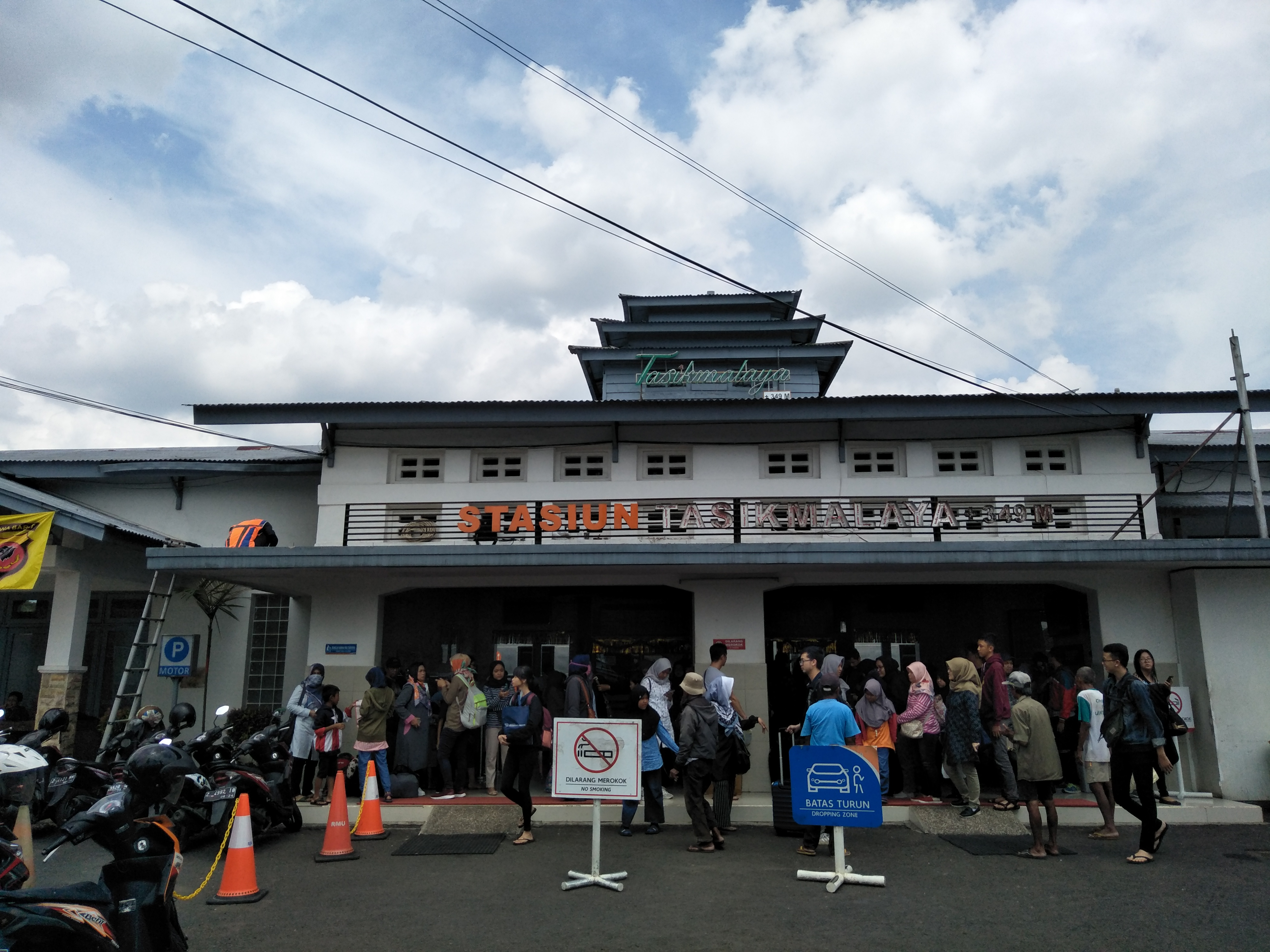 Stasiun Tasikmalaya